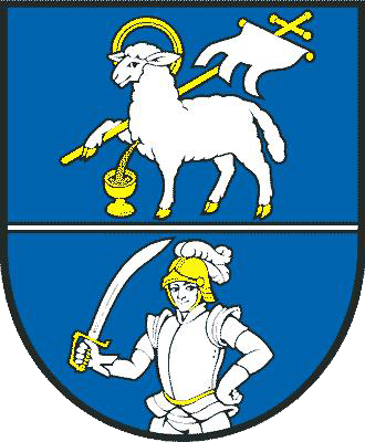 Erb obce Belá-Dulice